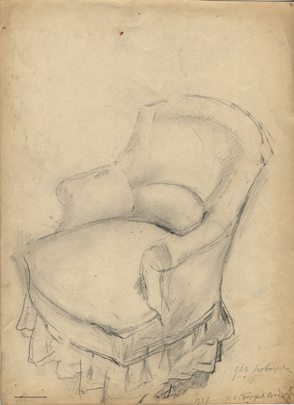 Кузьма Петров-Водкин (1878-1939). Кресло. РГАЛИ, ф. 2010 оп. 1 ед. хр. 92 л. 7. Кресло. Этюд к картине "Новоселье". Набросок.